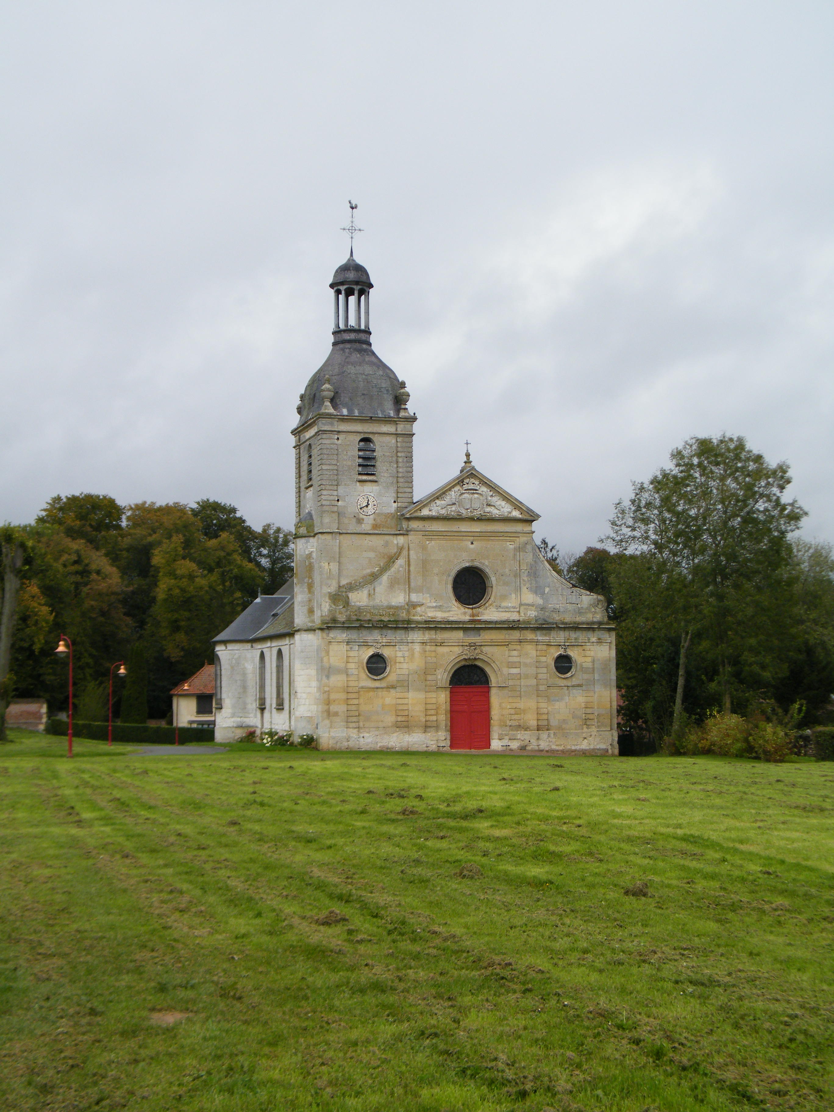 église.